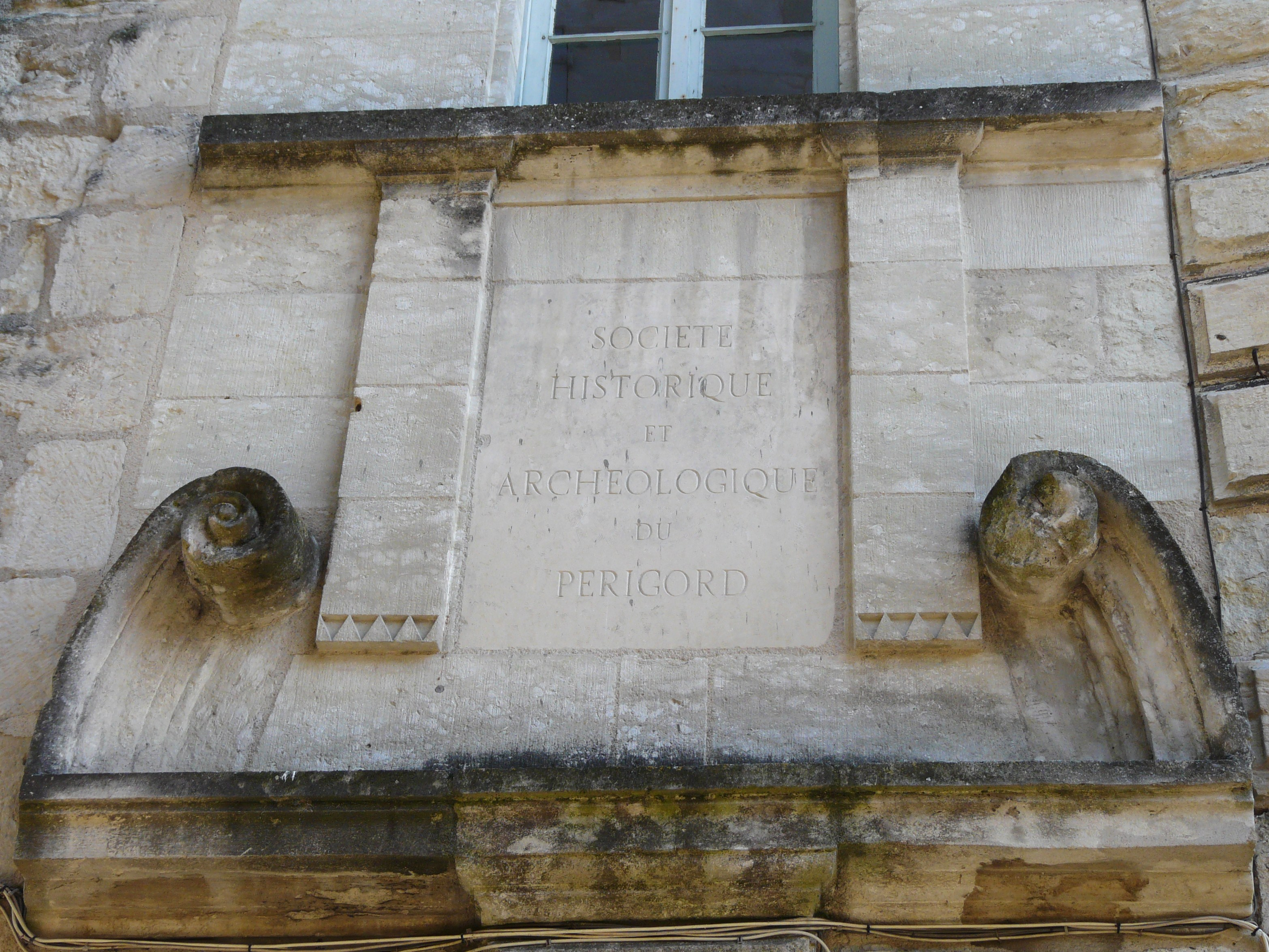 Inscription au-dessus de la porte de l'immeuble situé 18 rue du Plantier, Périgueux, Dordogne, France.